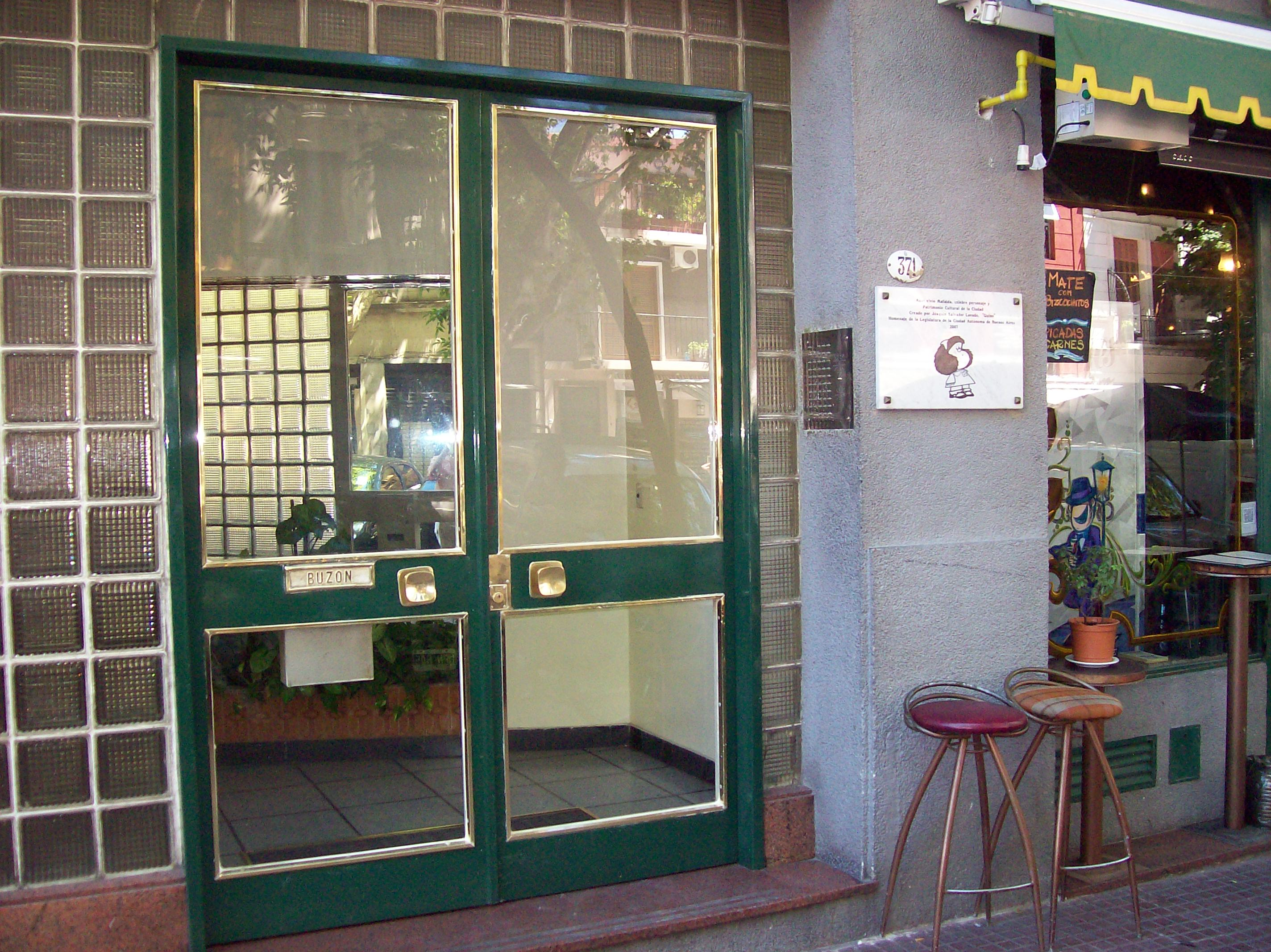 Puerta en la que se inspiró Quino para hacer el dibujo del edificio en que vivió Mafalda. El edificio queda cerca de la que era su casa, en la calle Chile al 371, Barrio de San Telmo, Buenos Aires, Argentina.